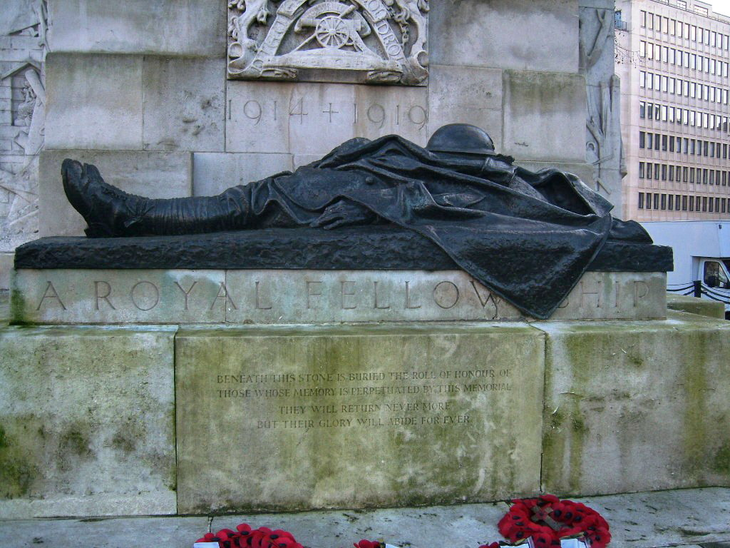 Jagger artillery memorial